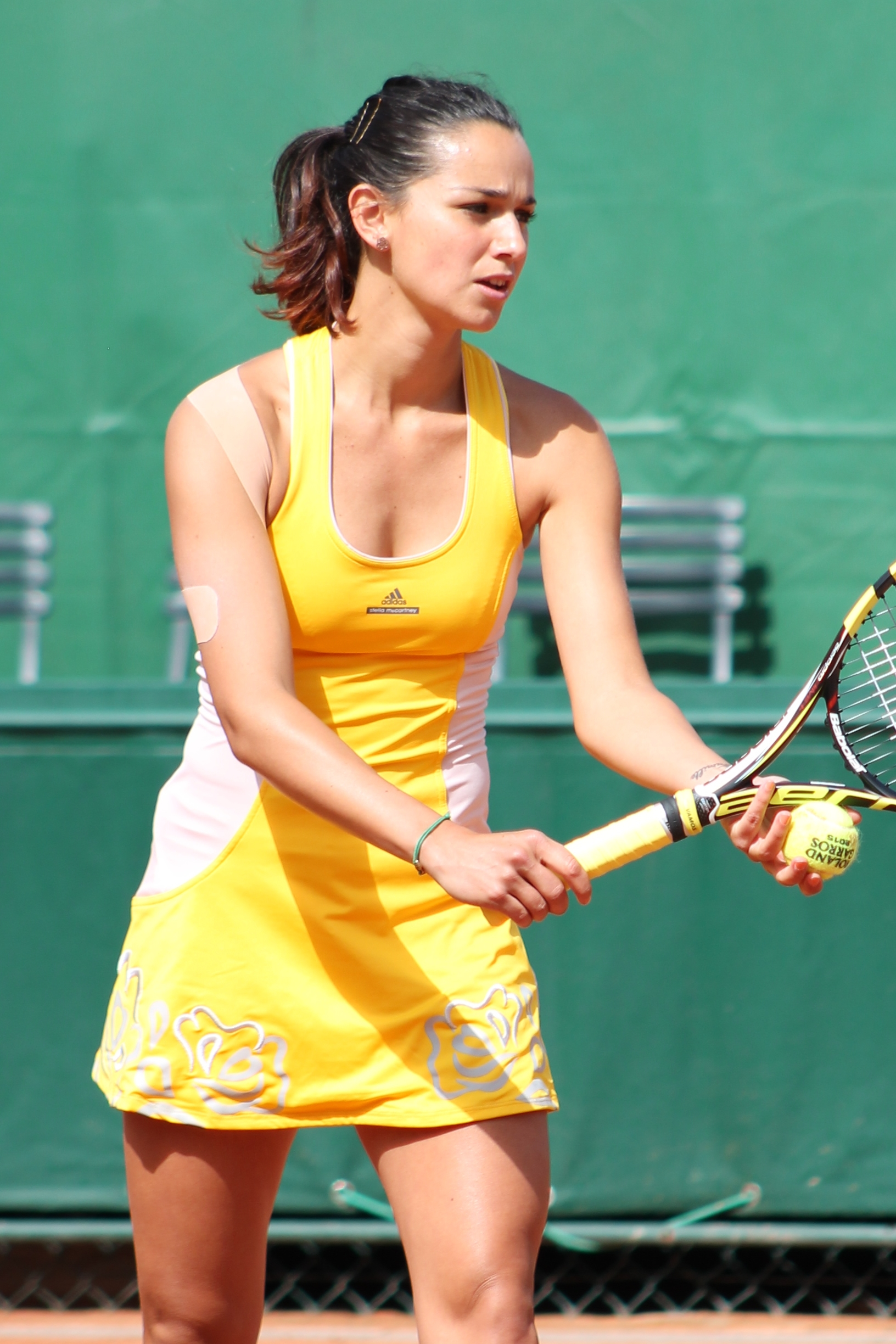 Hesse RG15 (17)